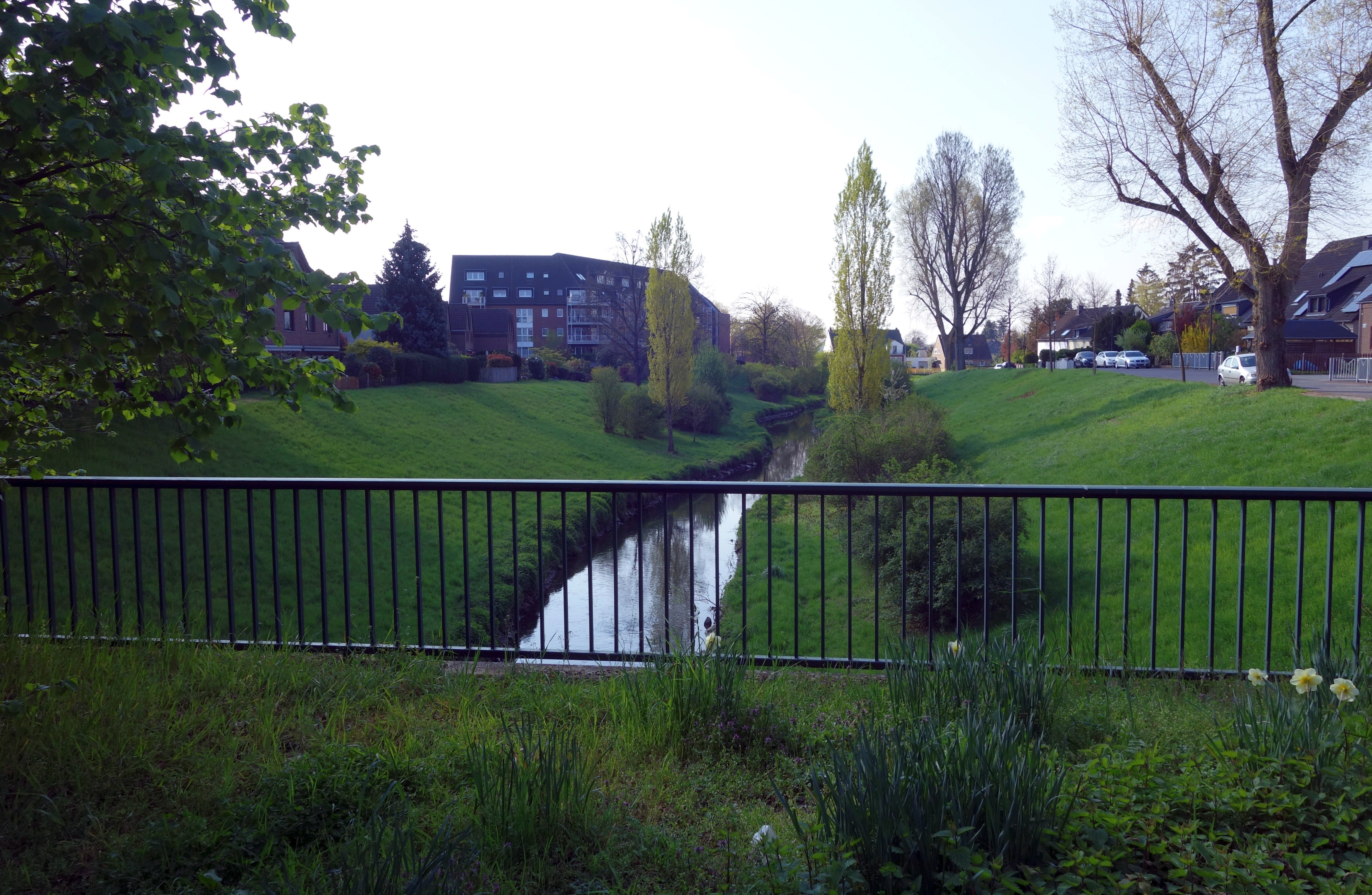 Brückerbach, Höhe Am Gansbruch 39b, Düsseldorf.